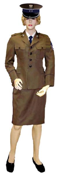 Umundurowanie wyjściowe ABW funkcjonariusza kobiety z spódnicą